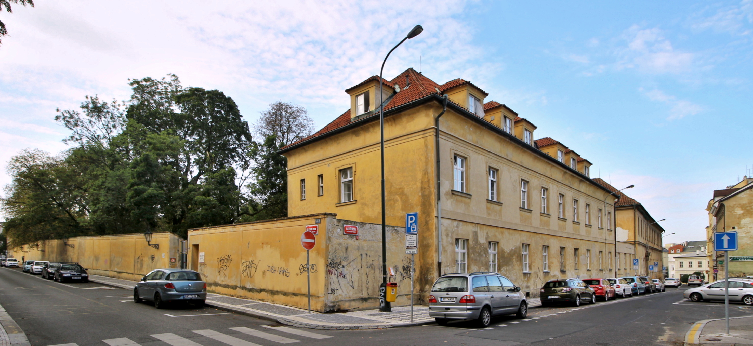 Klášter augustiniánek při kostele sv. Kateřiny v Praze-Novém Městě